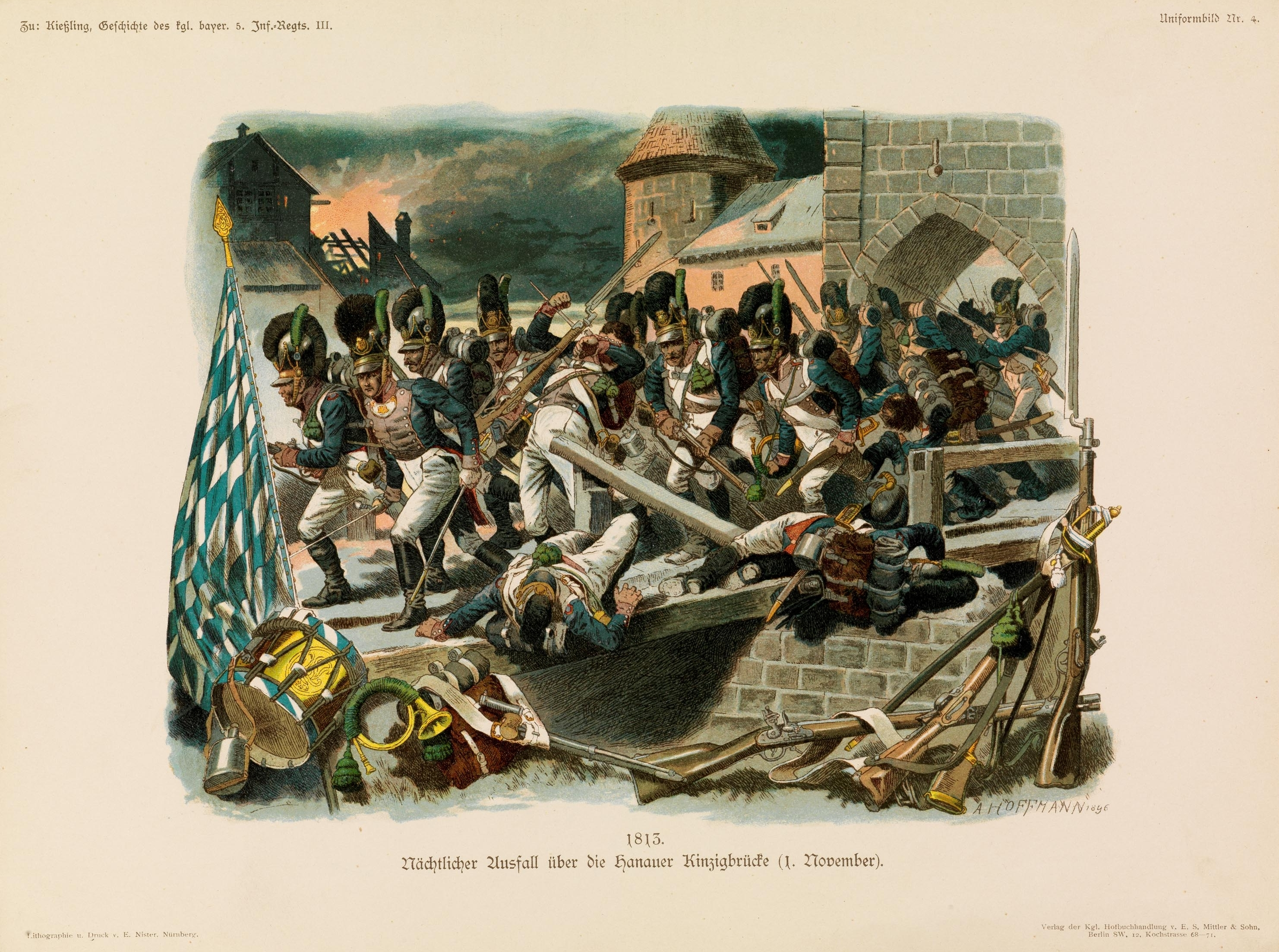 Uniform-Bilder zur Geschichte des Königl. Bayer. 5. Infanterie-Regiements Grossherzog Ernst Ludwig von Hessen. Lithographie und Druck v. E. Nister, Nürnberg. Verlag der Kgl. Hofbuchhandlung v. E. S. Mittler & Sohn, Berlin.